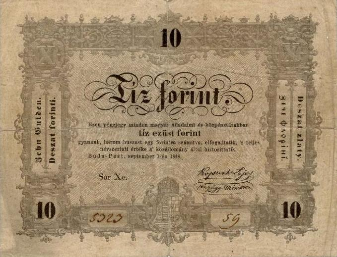 10 forint, 1848 szeptember 1. előoldal